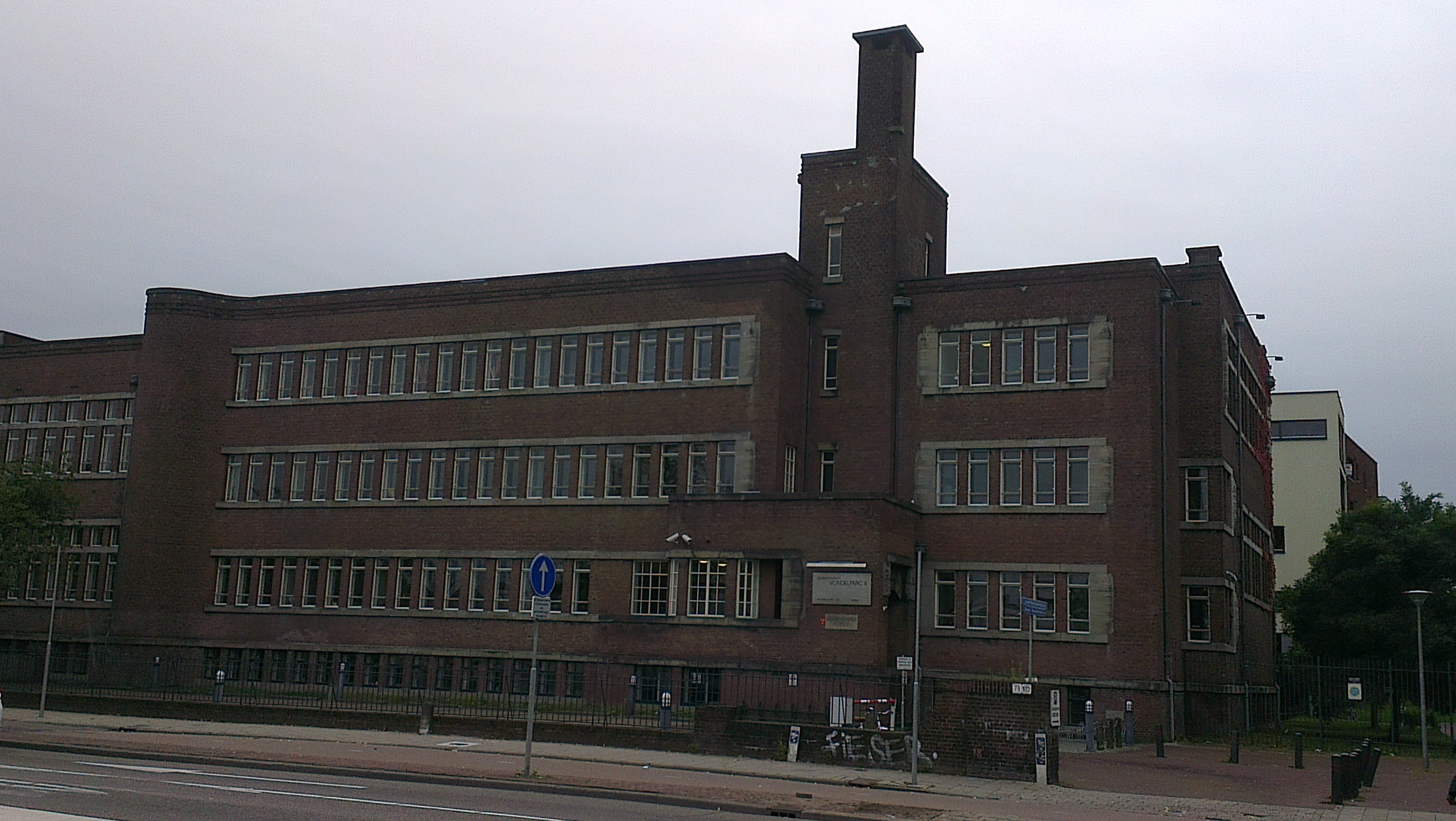 Rudolph Magnus Instituut